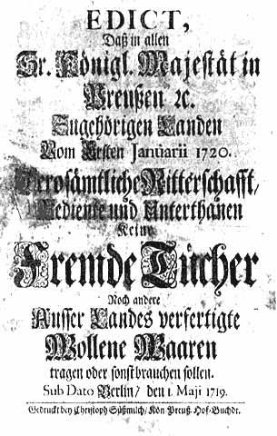 königliches (preußisches) Edikt eines Einfuhrverbots für Tuche und Wollwaren